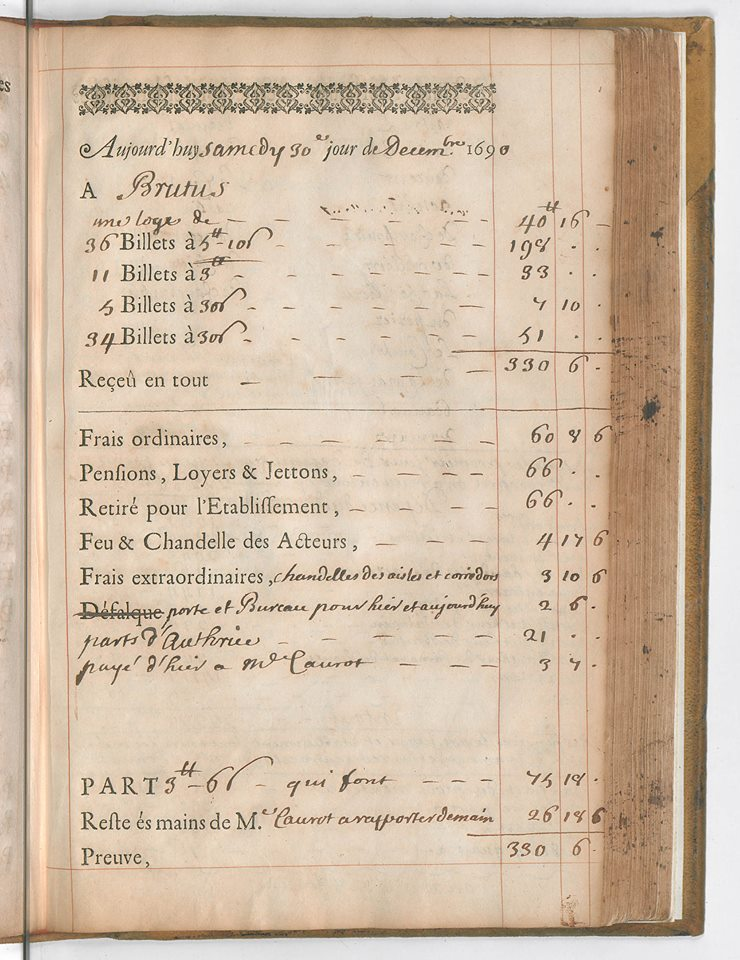 Page extraite du Registre des comptes, tenu par le comédien Lagrange, pour la représentation de la tragédie Brutus, de Catherine Bernard, 30 décembre 1990